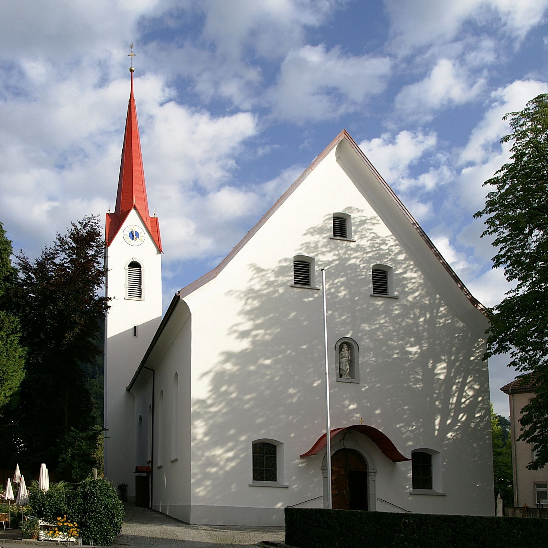 Pfarrkirche Maria Heimsuchung im Stadtbezirk Haselstauden von Dornbirn